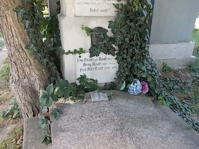 Riki Raab Grabstätte